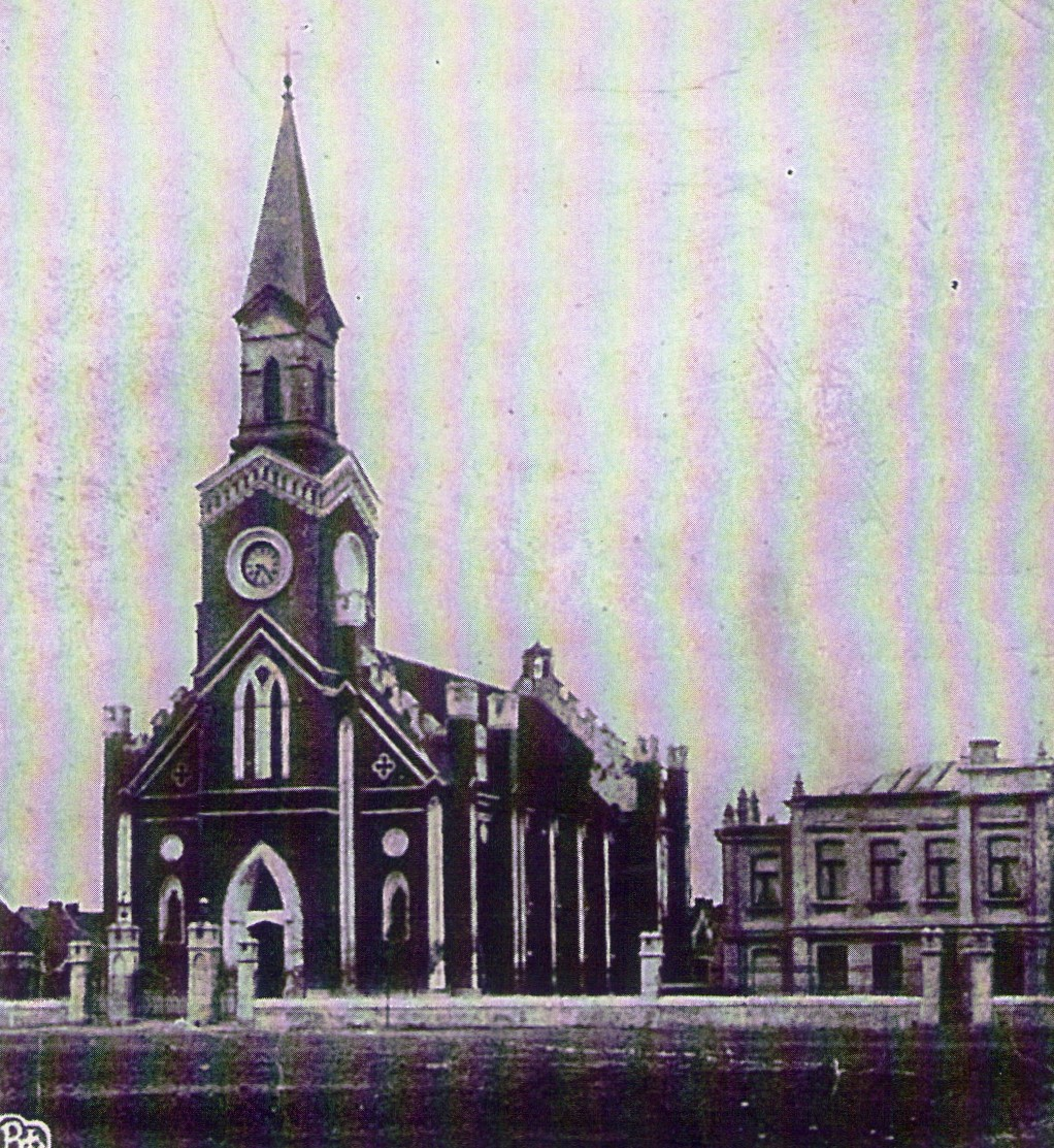 Zdjęcie kościoła z 1912 roku